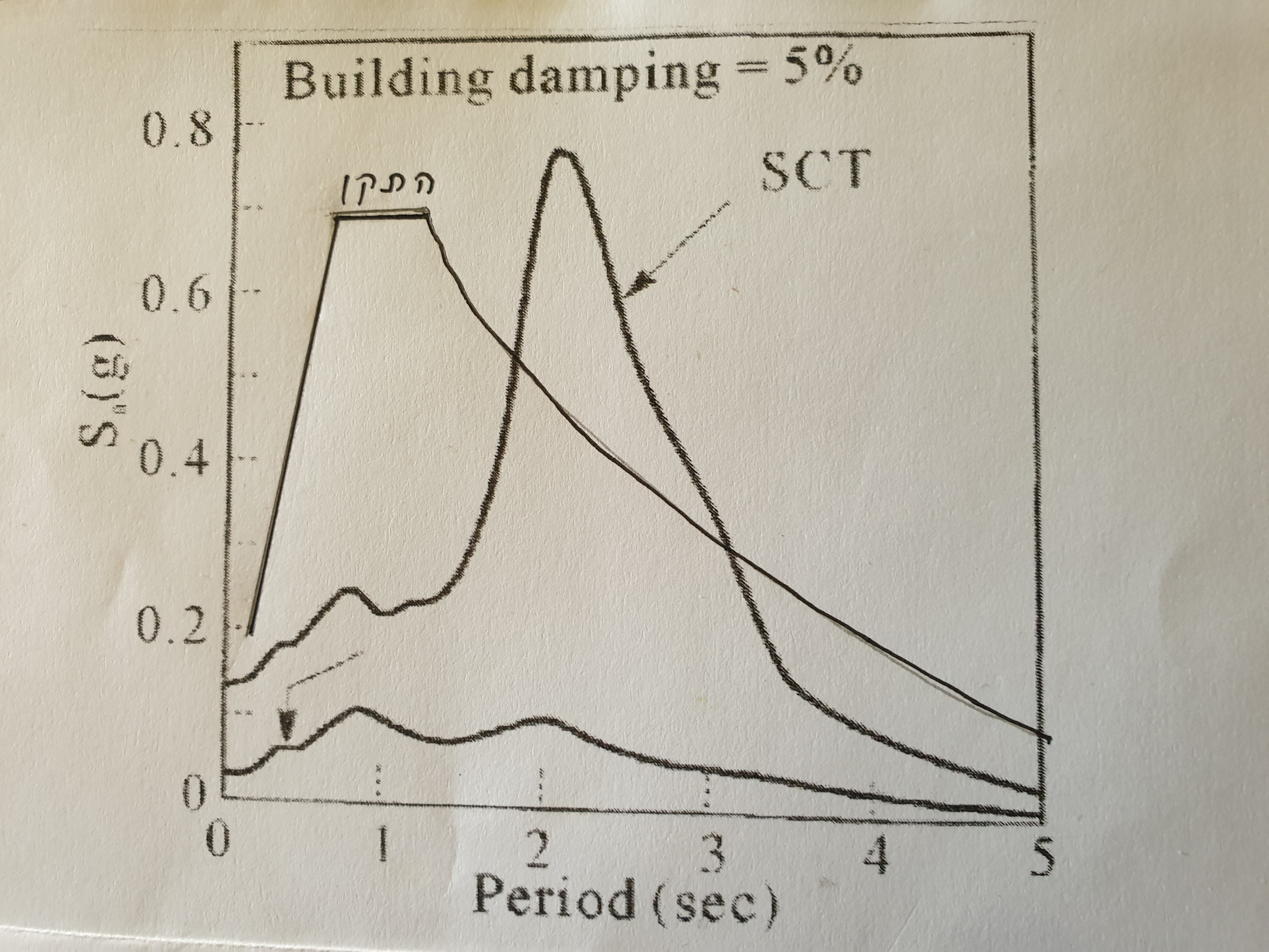 תגובת אתר מול תקן בנייה